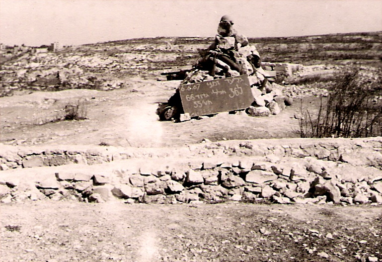 הגלעד הזמני הספונטני לחיילים שנהרגו בגבעת התחמושת על הגבעה החשופה 1967